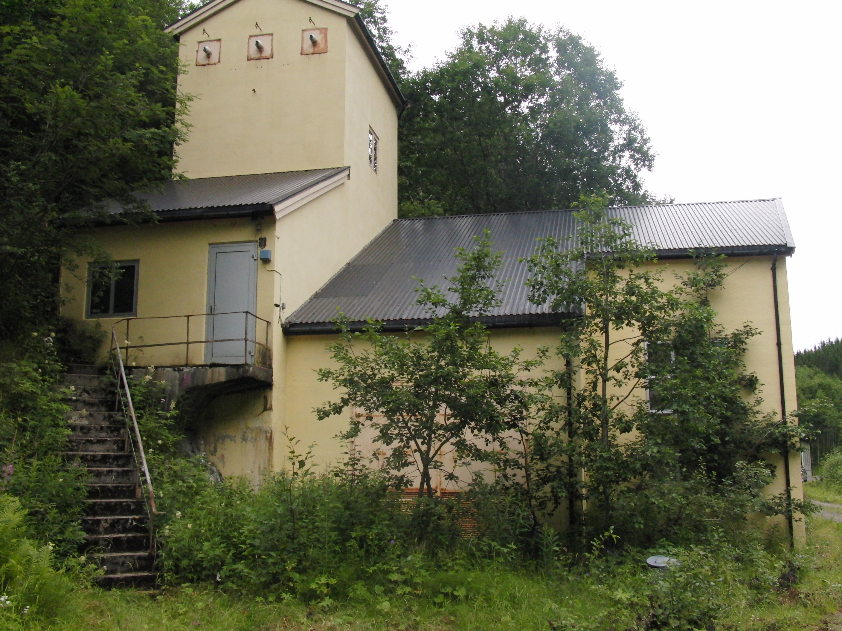 Andåsfossen gamle kraftverk, nedlagt